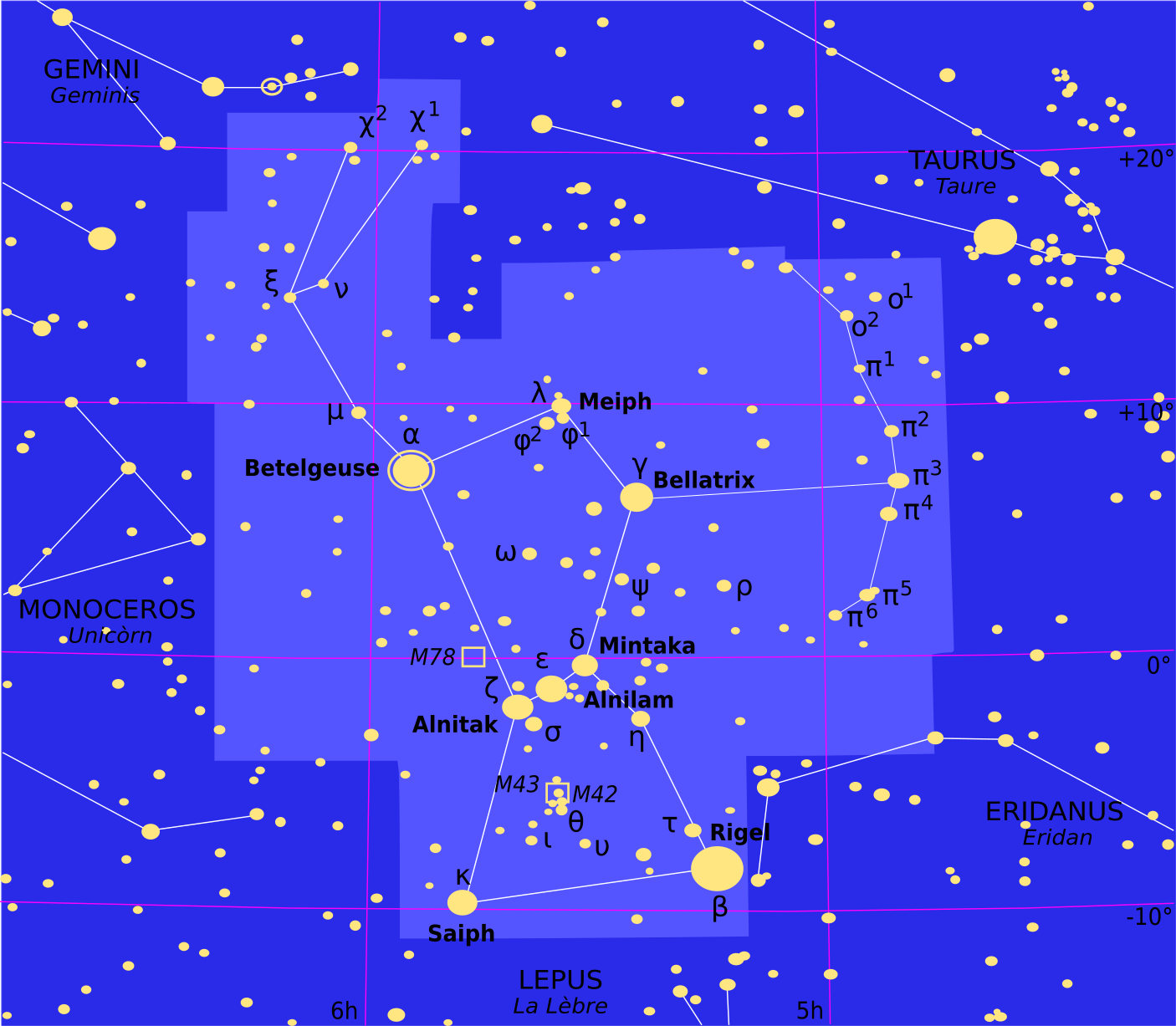 Constellacion d'Orion.